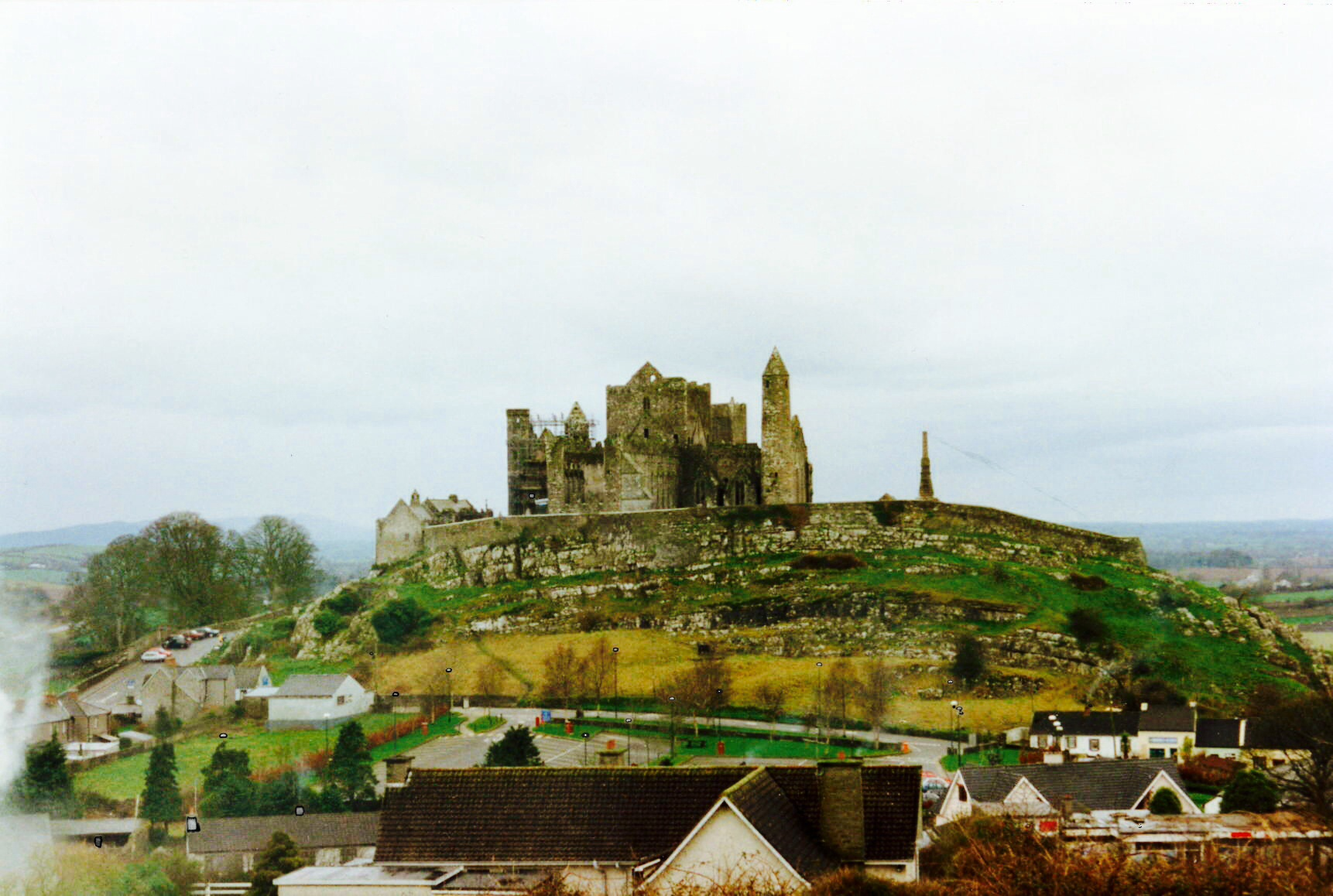 Vue générale du Rock of Cashel en Irlande